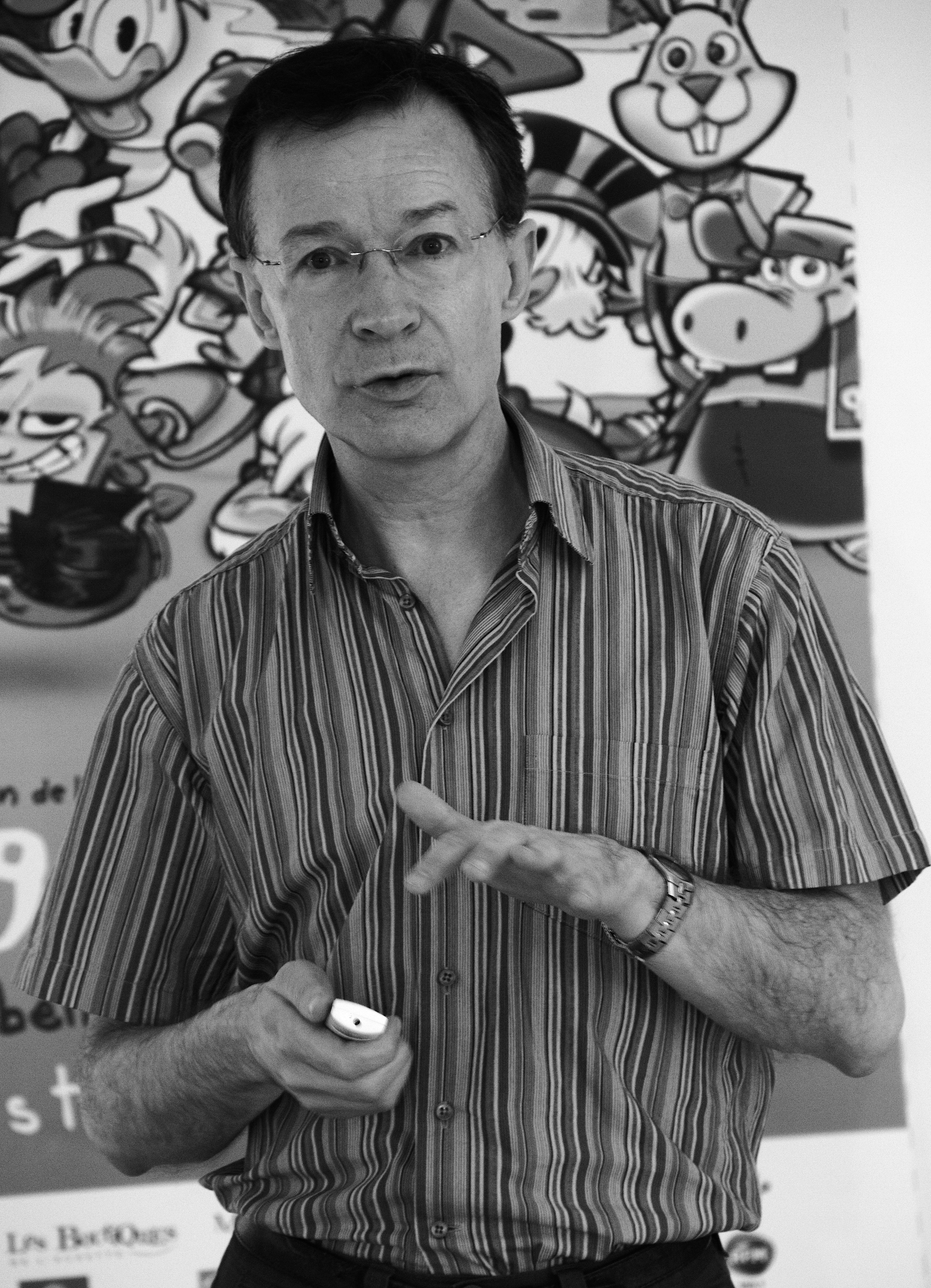 Paul Gravett au 6ème festival européen de la bande dessinée de Strasbourg. Paul Gravett est un critique de bande dessinée britannique. Il a publié de nombreux ouvrages, dont certains traduits en français, travaillé pour la presse et organisé des expositions.